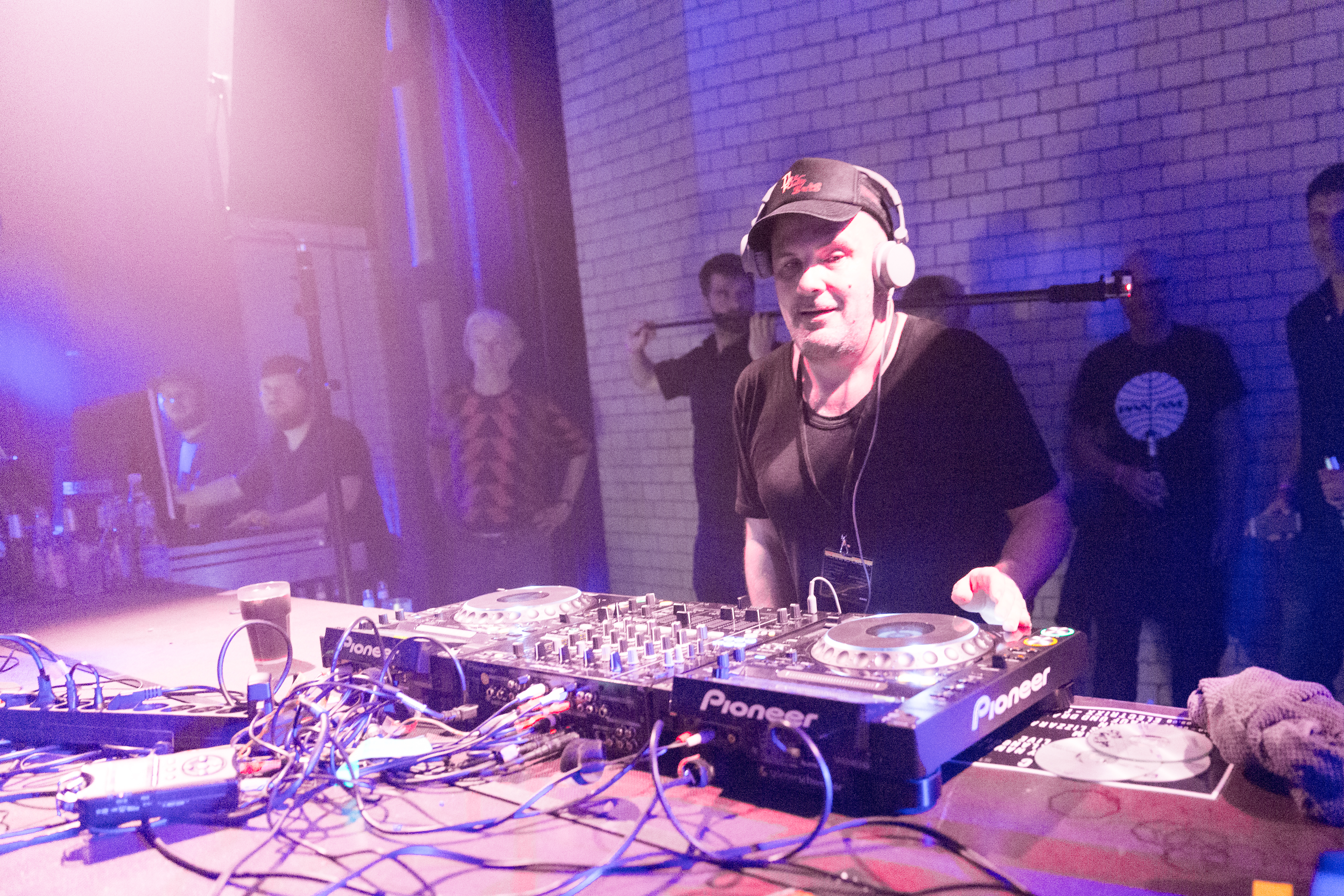 WestBam (bürgerlich Maximilian Lenz) - Dieses Bild ist auf dem Sterne und Bass Festival am 30. Januar 2916 im Berliner E-Werk entstanden.